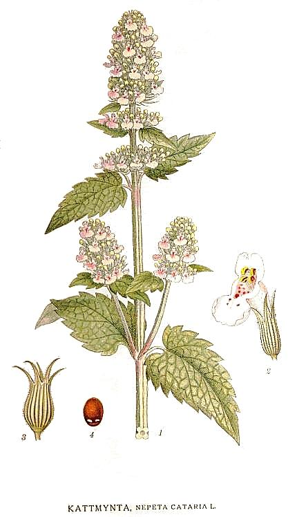 Original Description Kattmynta, Nepeta cataria L.